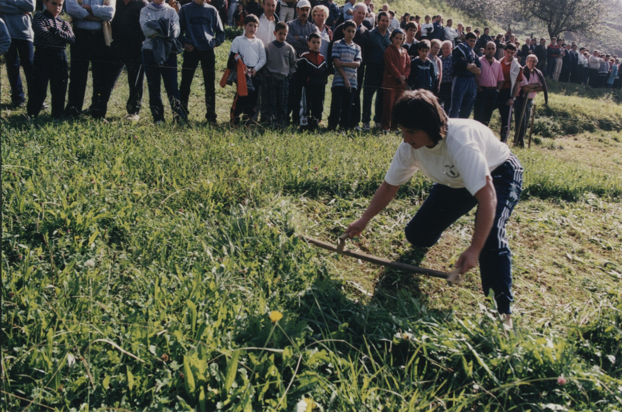 Segalari proba Zaldibiako Santa Fe jaietan 1999. urtean